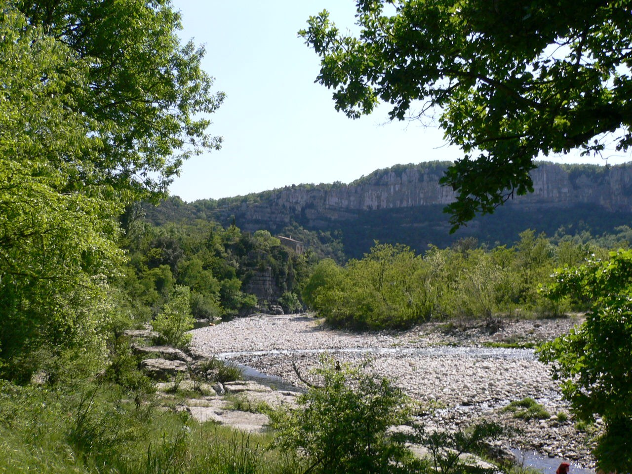 Entrée des gorges de la Beaume, entre Rosières et Labeaume